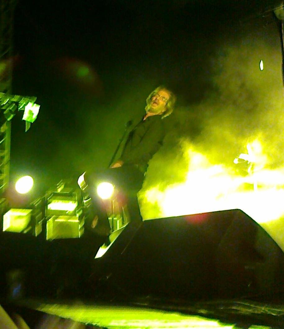 בהופעה של משינה